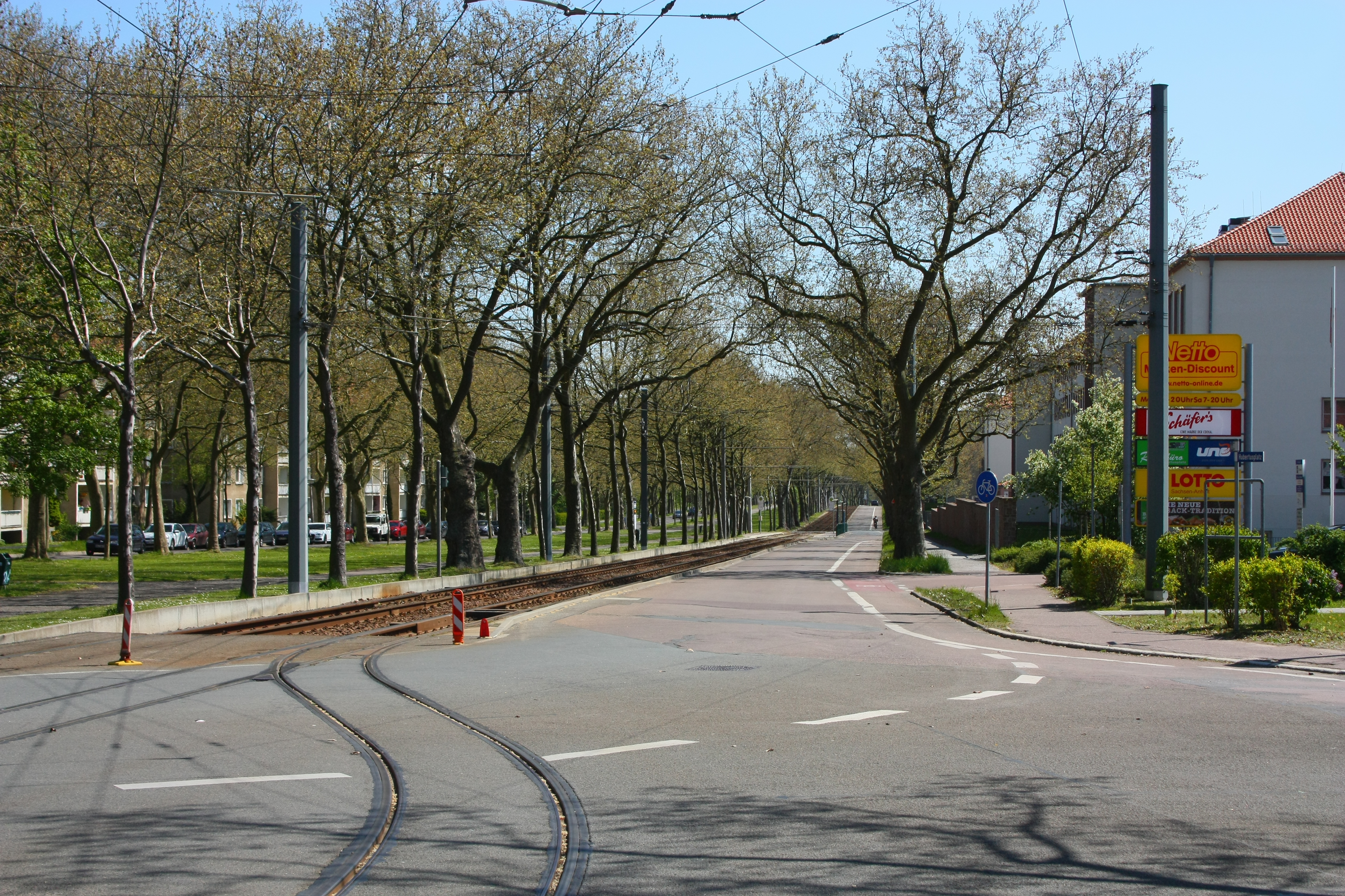 Blick von Norden auf die Heideallee in Heide-Süd in Halle (Saale) im Frühling